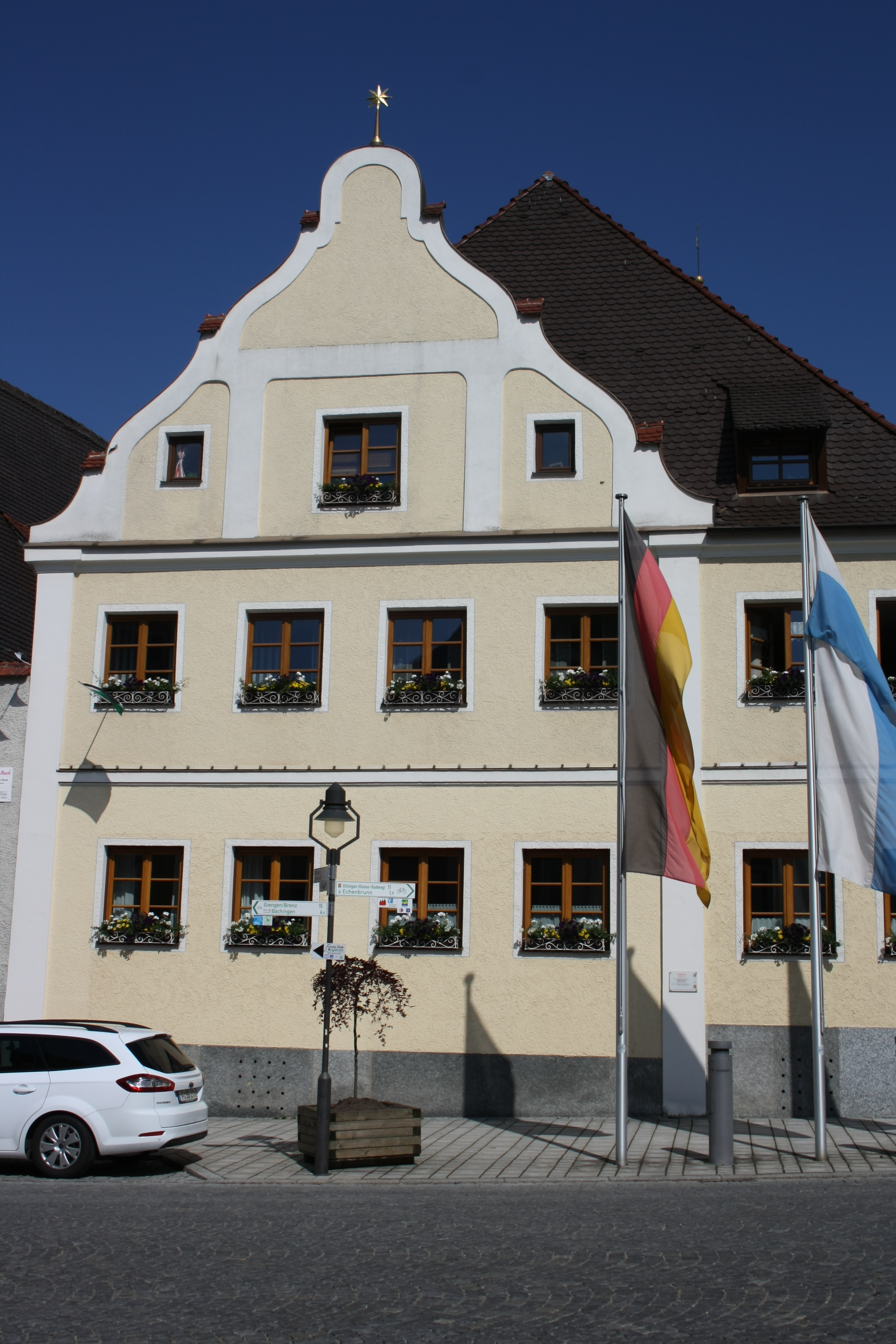 Ehemaliges Gasthaus zum Stern, Hauptstraße 26, in Gundelfingen an der Donau im schwäbischen Landkreis Dillingen an der Donau (Bayern/Deutschland)